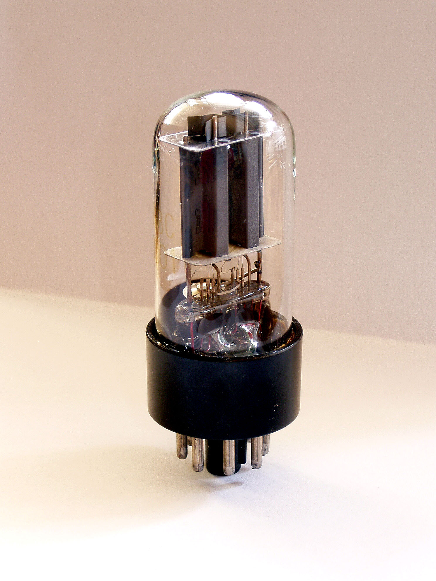 6N8S - Ein russischer Nachbau der amerikanischen Doppeltriode 6SN7 GT